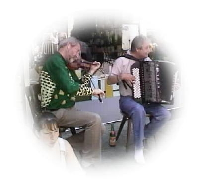 Feckerchilbi, Fest des jenischen Volkes, in Gersau, Schweiz, 2003